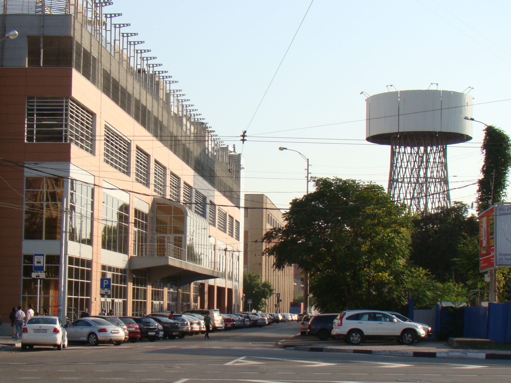 Краснодар. Улица Ращпилевская - ул. Северная. Справа - Шуховская башня.